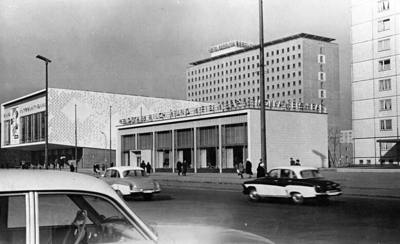 Zentralbild Kohls 25.3.1964 Karl-Marx-Allee in Berlin Links : Kino "International" Mitte: Mokka-, Milch- und Eisbar. Im Hintergrund das neue Hotel "Berolina".